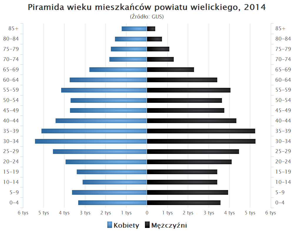 Piramida wieku mieszkańców powiatu wielickiego, 2014